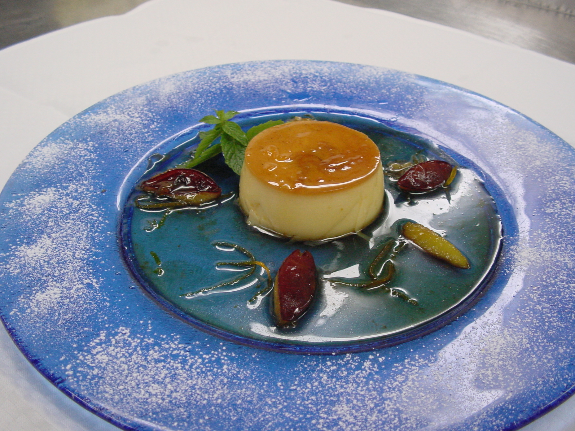 Caramelcreme mit Pflaumen. Aufgenommen von Heinz Wehmann.